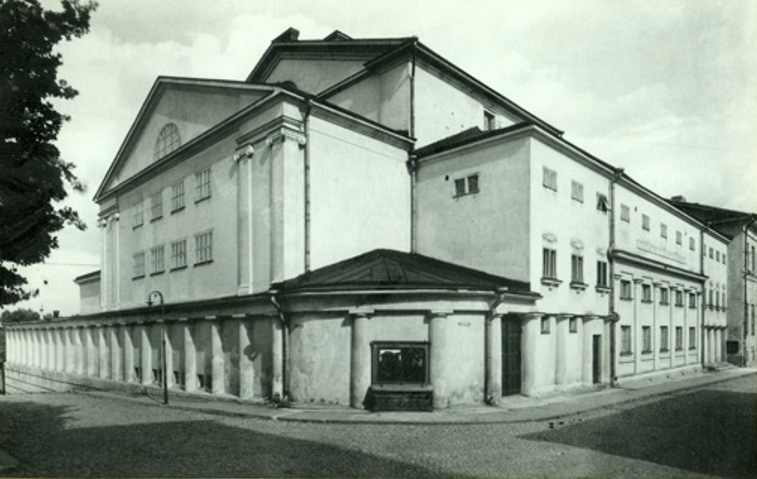 Выборгский театр